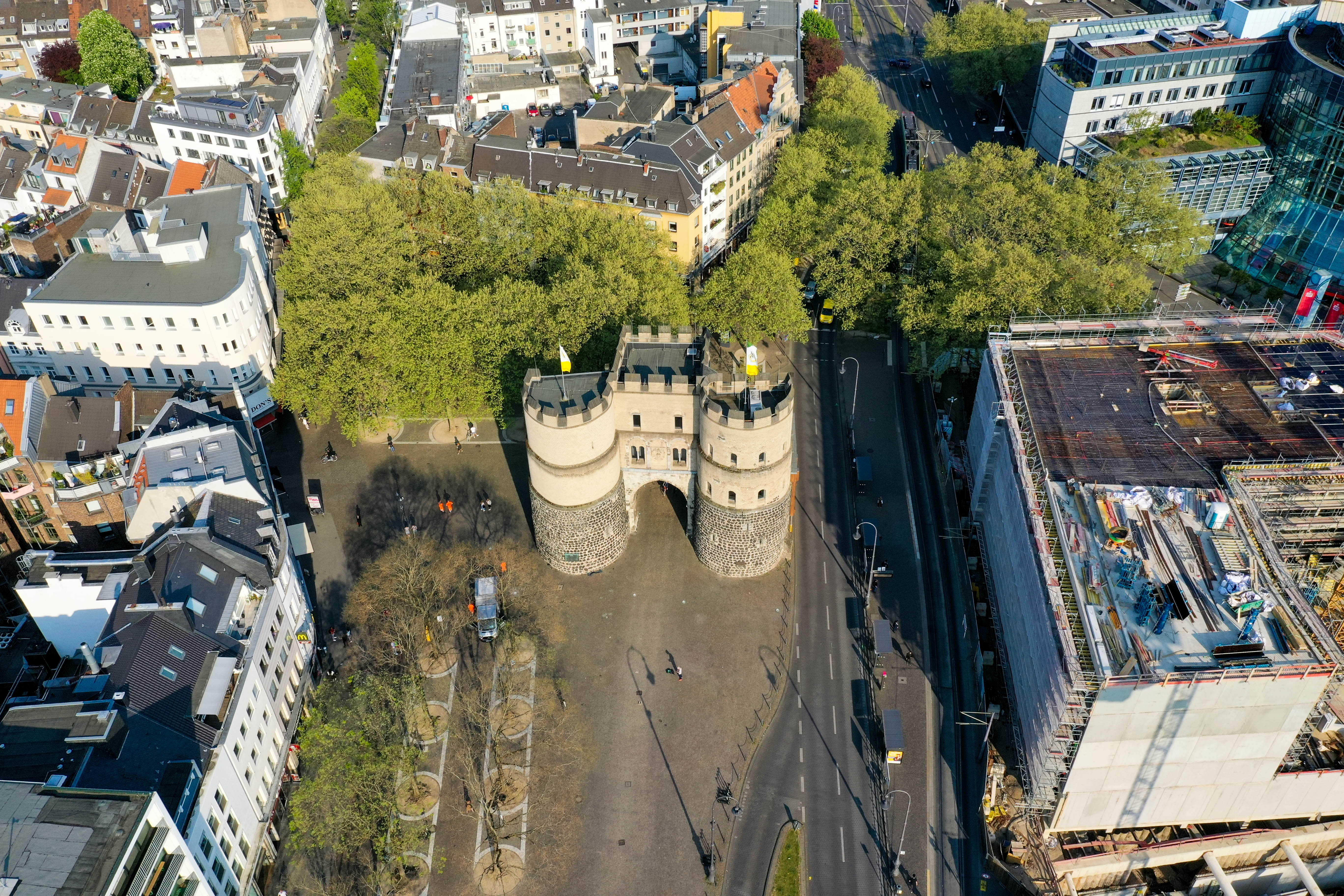 Köln Rudolfplatz mit Hahnentorburg – April 2020. Drohnenaufnahme mit Genehigung der zuständigen Stellen und Ämter.